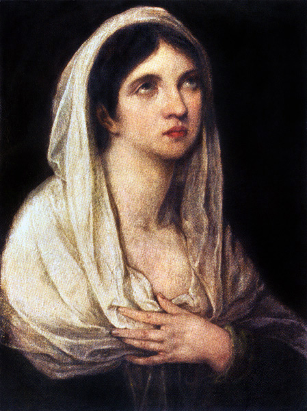 Елизавета Александровна Демидова (1779-1818) в образе Марии Магдалины.